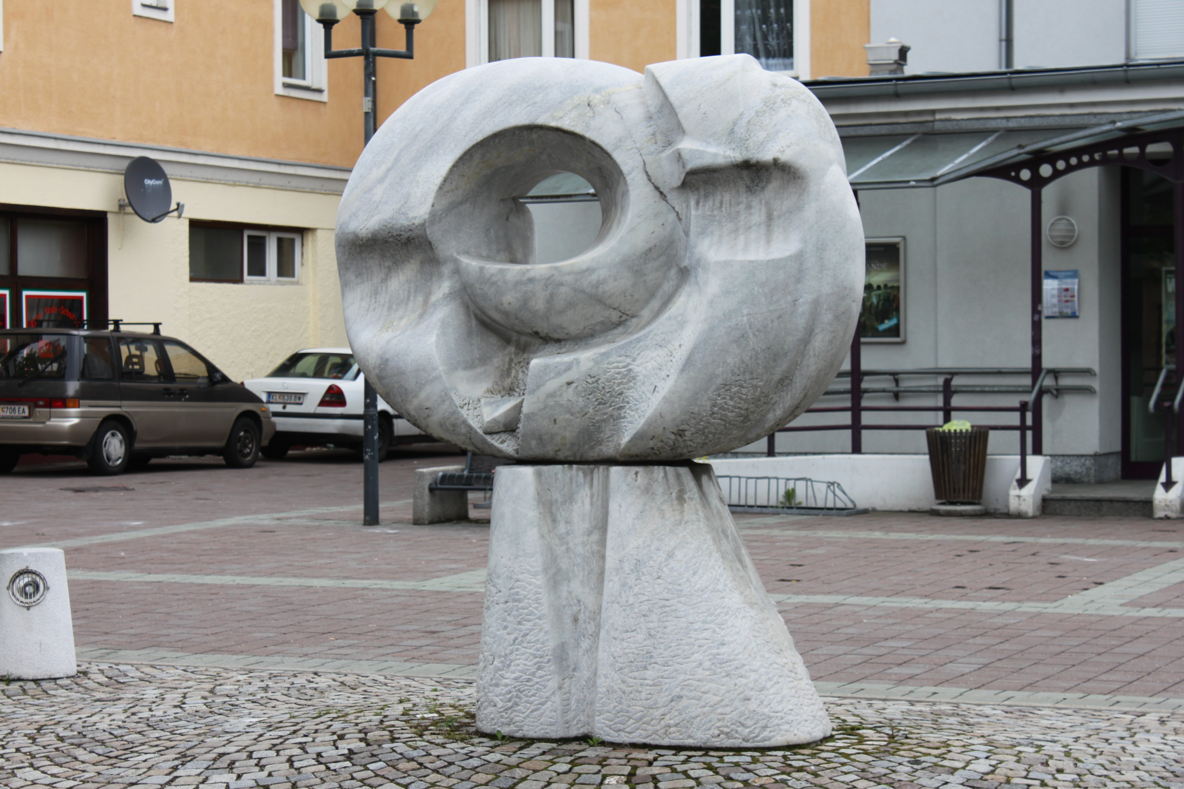 Herbert Unterberger, Skulptur, Form-Zeit, 1993 / 1994, vor dem Gemeindezentrum St. Ruprecht, St. Ruprechter Straße, Klagenfurt